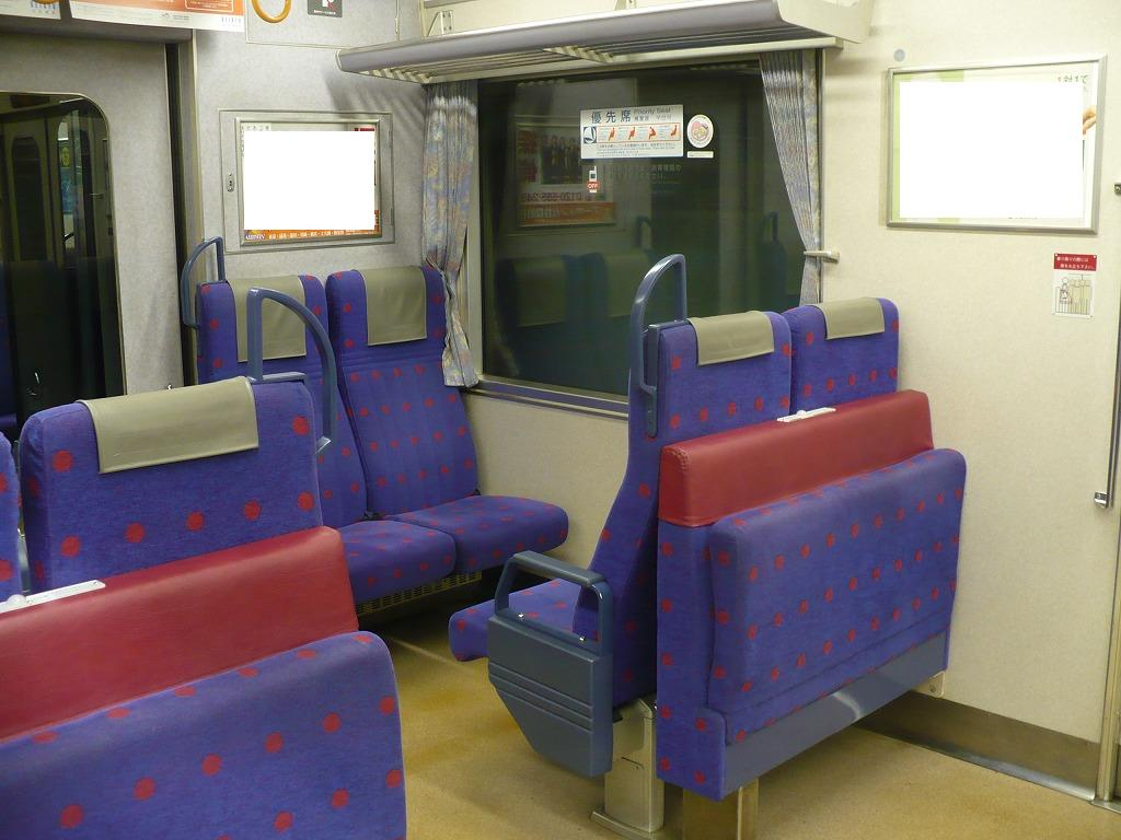 京急2100形車内